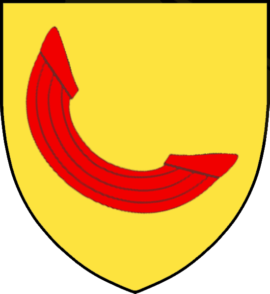 Vapensköld för Erengisle Sunesson (Bååt)